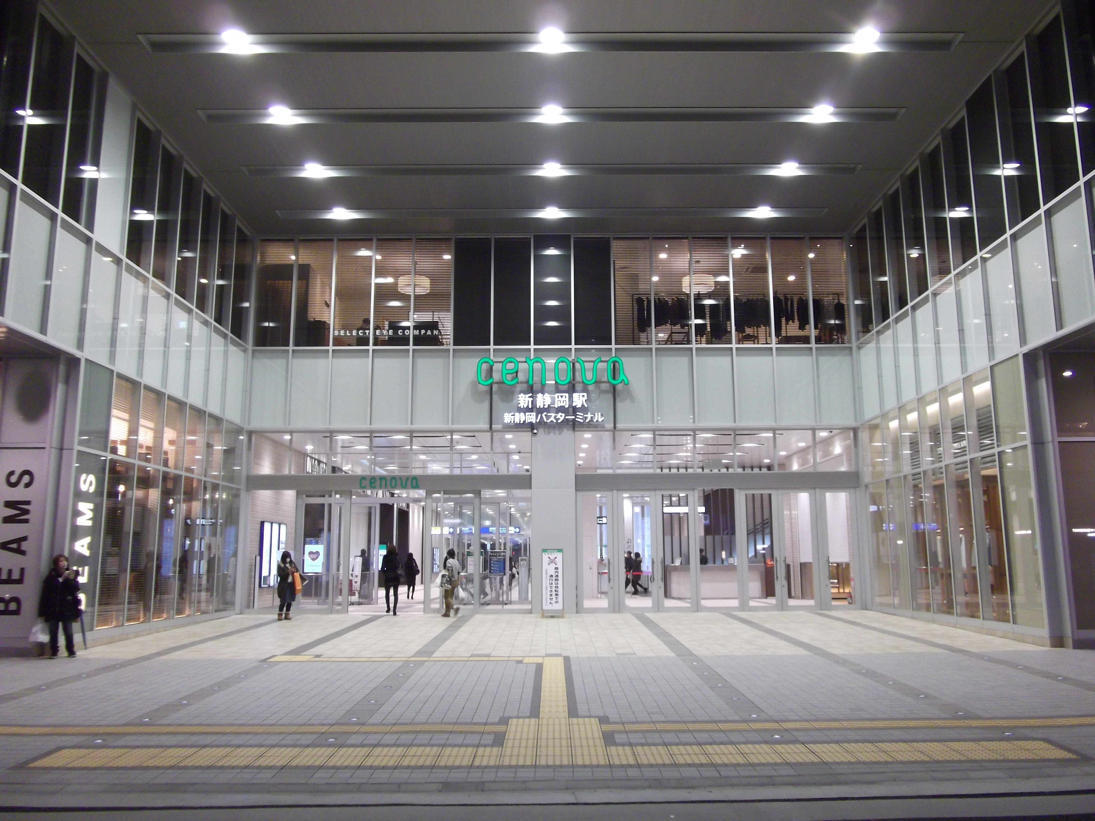 新静岡駅・けやき通り口